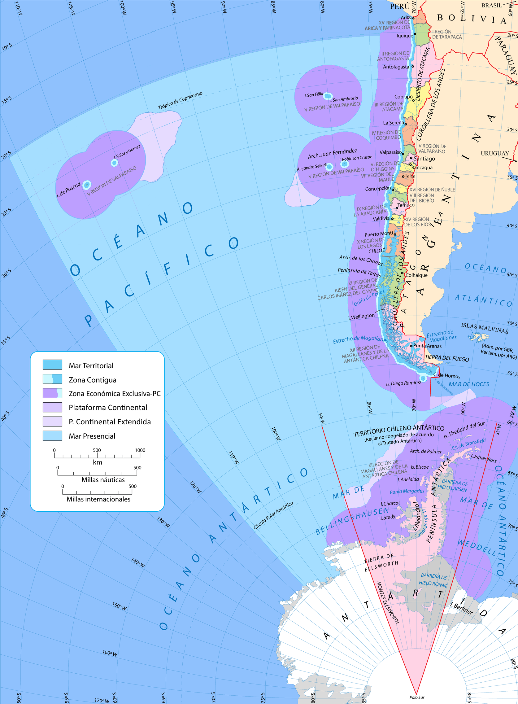 Mapa de Chile Tricontinental. Visión nacional que incluye el Territorio Chileno Antártico y las islas de Oceanía (Pascua y Salas y Gómez). Muestra las zonas marítimas, incluyendo el mar Presencial. Proyección azimutal equiárea centrada en lat -53.75 lon -70